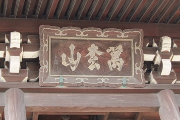 萬松山扁額